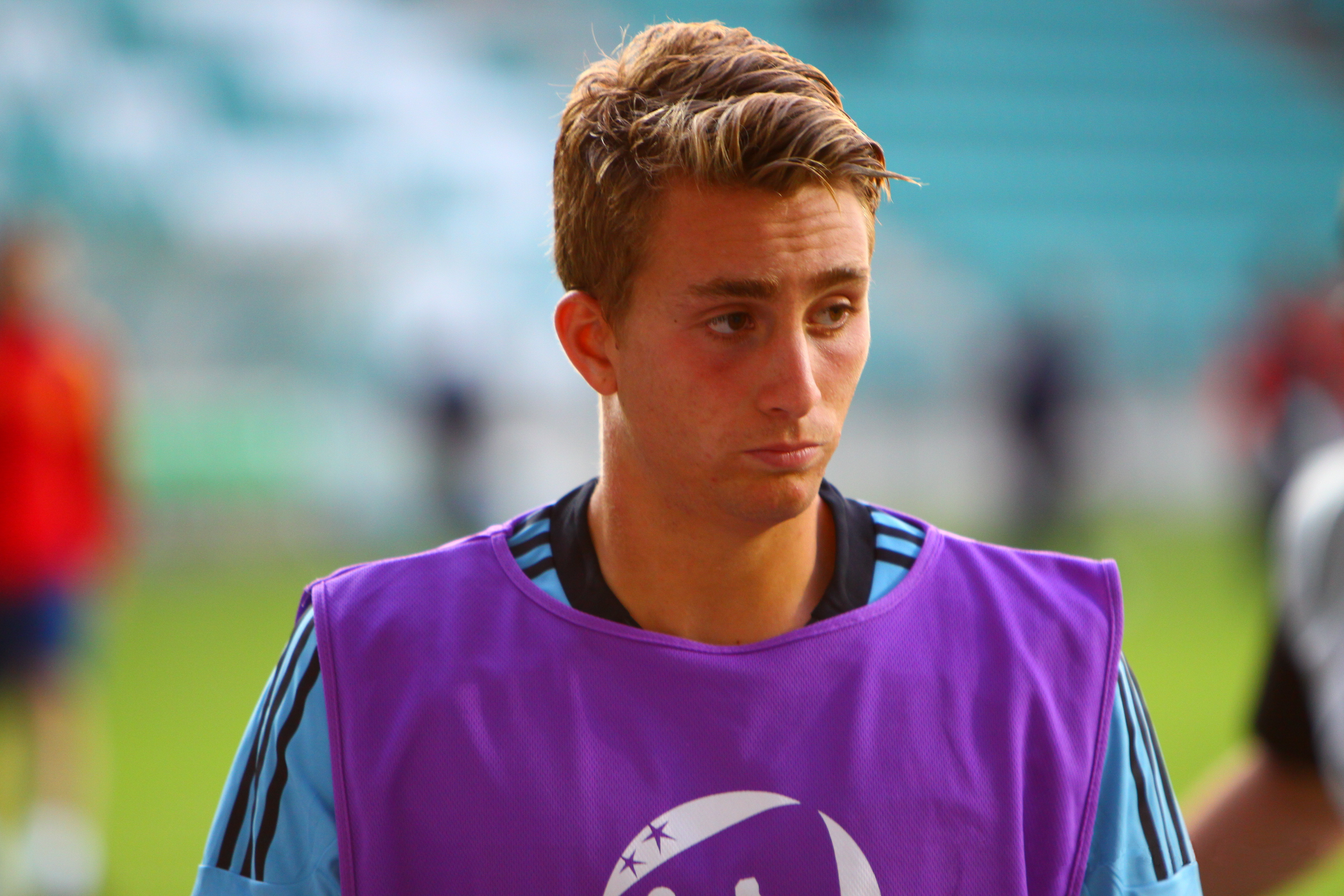 U-19 Portugal vs Spain.